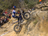 Iris Kramer en action.